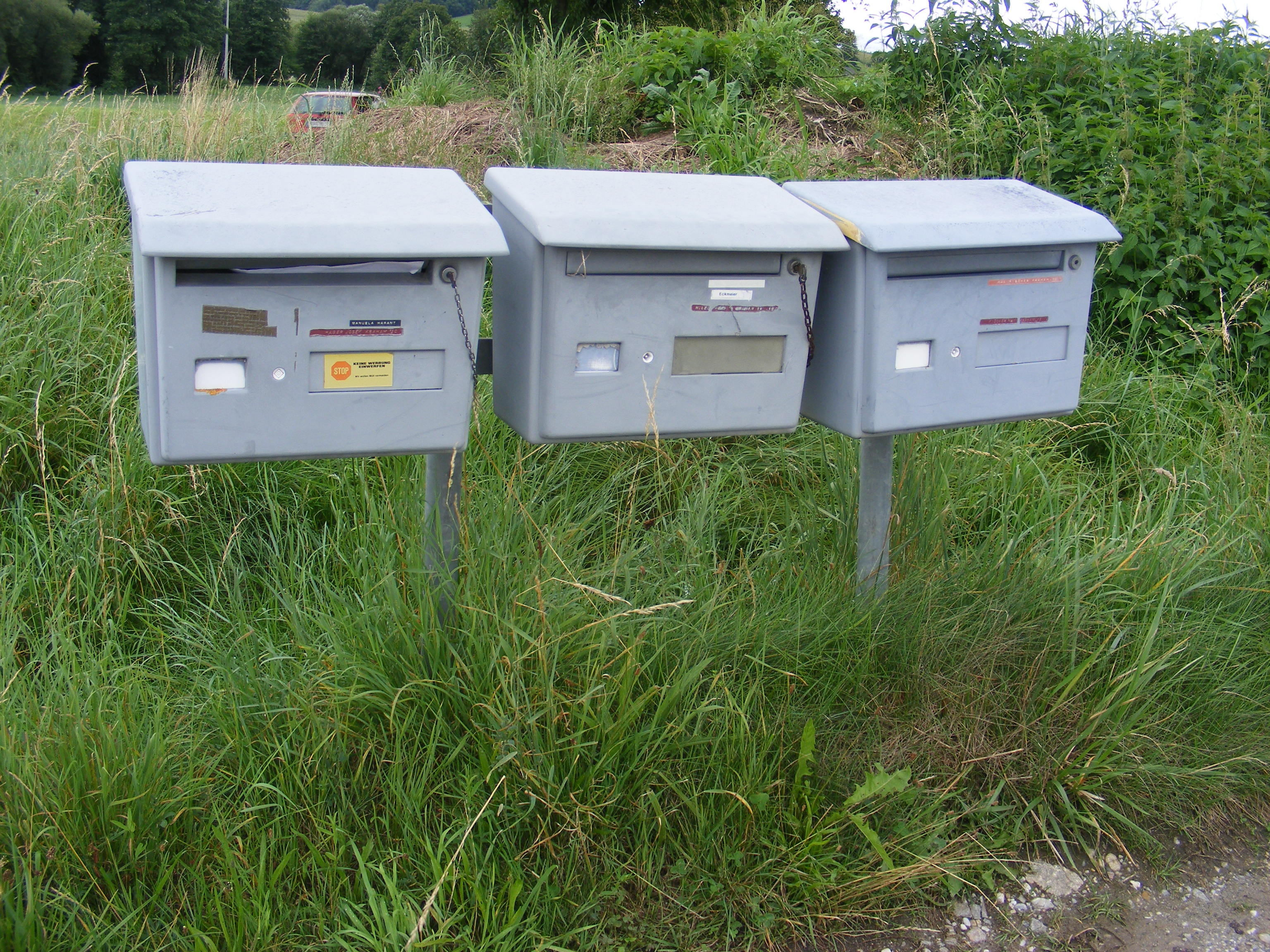 Ländliche Gruppenbriefkästen in Kraham-Ost, Gemeinde Johanniskirchen, Lkr. Rottal-Inn (Niederbayern)